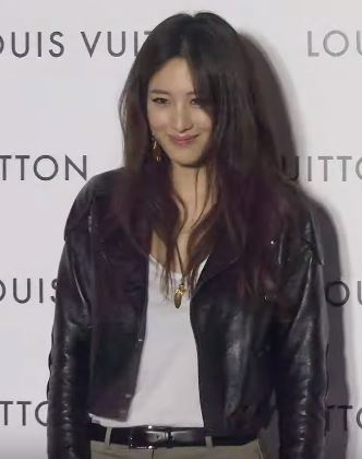 10일 오후 서울시 용산구 한남동 현대카드 바이닐앤플라스틱에서 '루이 비통'이 전 세계 최초 한국에서 '트위스트 백' 팝업 스토어오픈 행사를 가져 수현이 참석해 포토월에서 포즈를 취하고 있다.